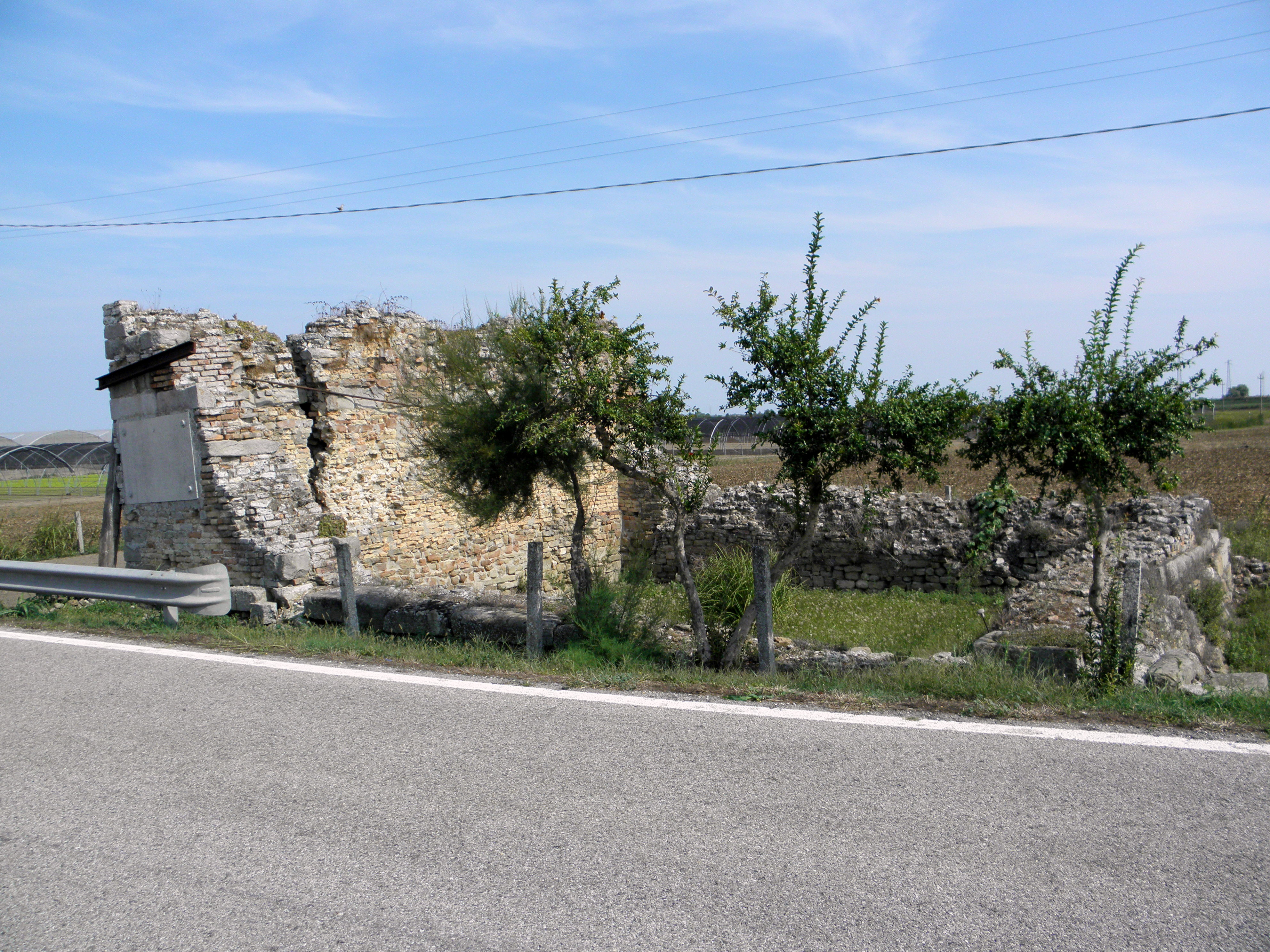 Cà Bianca, frazione di Chioggia: i ruderi della Torre di Bebe (o Torre delle Bebbe).